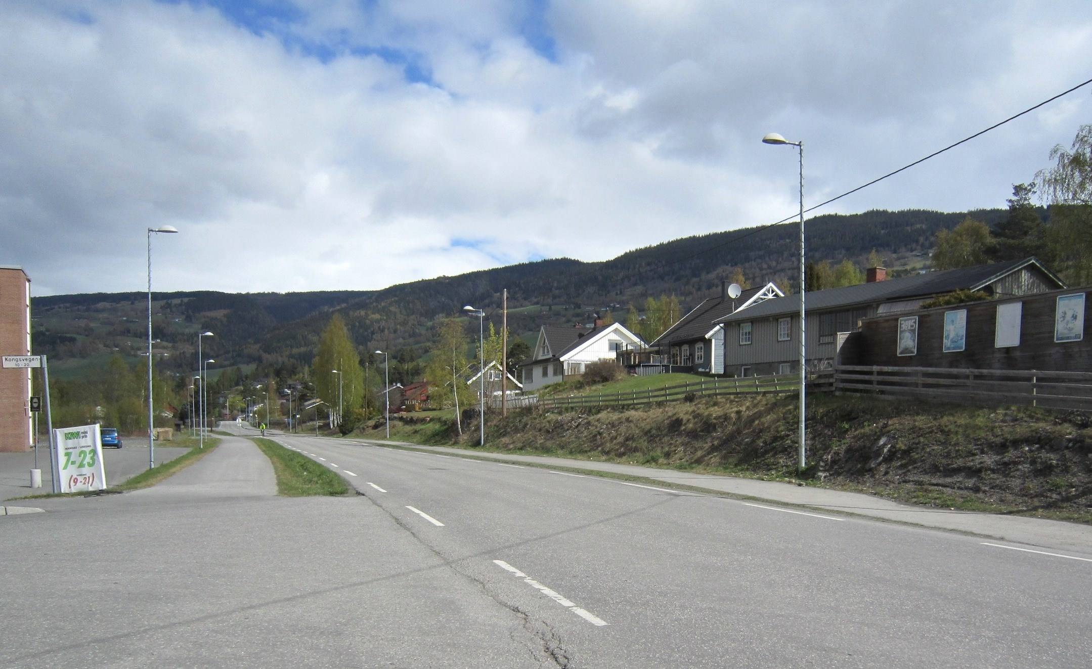 Fylkesvei 2522 (tidl. 312) i Øyer sentrum (Granrudmoen)